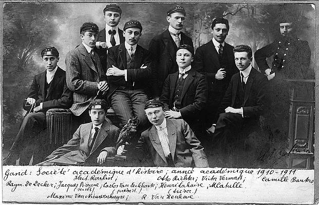 Groepsfoto van leden van de Société Académique d'Histoire in het academiejaar 1910/1911 : vlnr. 1ste rij Maxime Van Nieuwenhuyze, Richard Vankenhove; 2de rij Raymond De Decker, Jacques Pirenne (secretaris), Carlos Van Eeckho(?)ute (voorzitter), Henri Lahaise (penningmeester) en M. Catulle; 3de rij Hector Roulin, Otto Richter, Victor Vermast en Camille Bauters